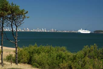 Península de Punta del Este, Isla Gorriti y un crucero de turismo desde Pinares